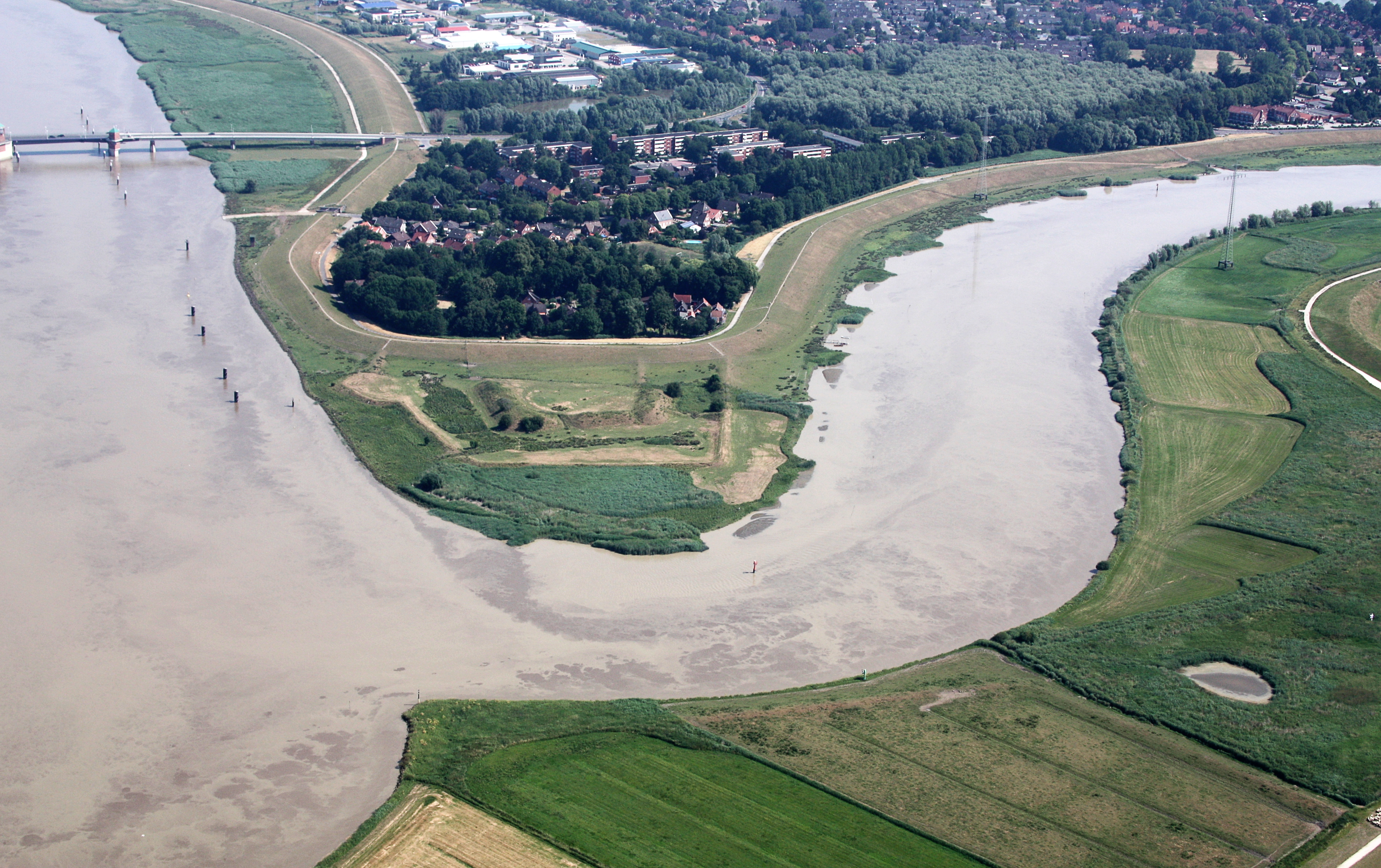 Luftaufnahme; Flug von Westerstede nach Leer; Flughöhe 1500 ft; Juli 2010; Originalfoto bearbeitet: Tonwertkorrektur und Bild geschärft mit Hochpassfilter – Mündung der Leda (rechts) in die Ems